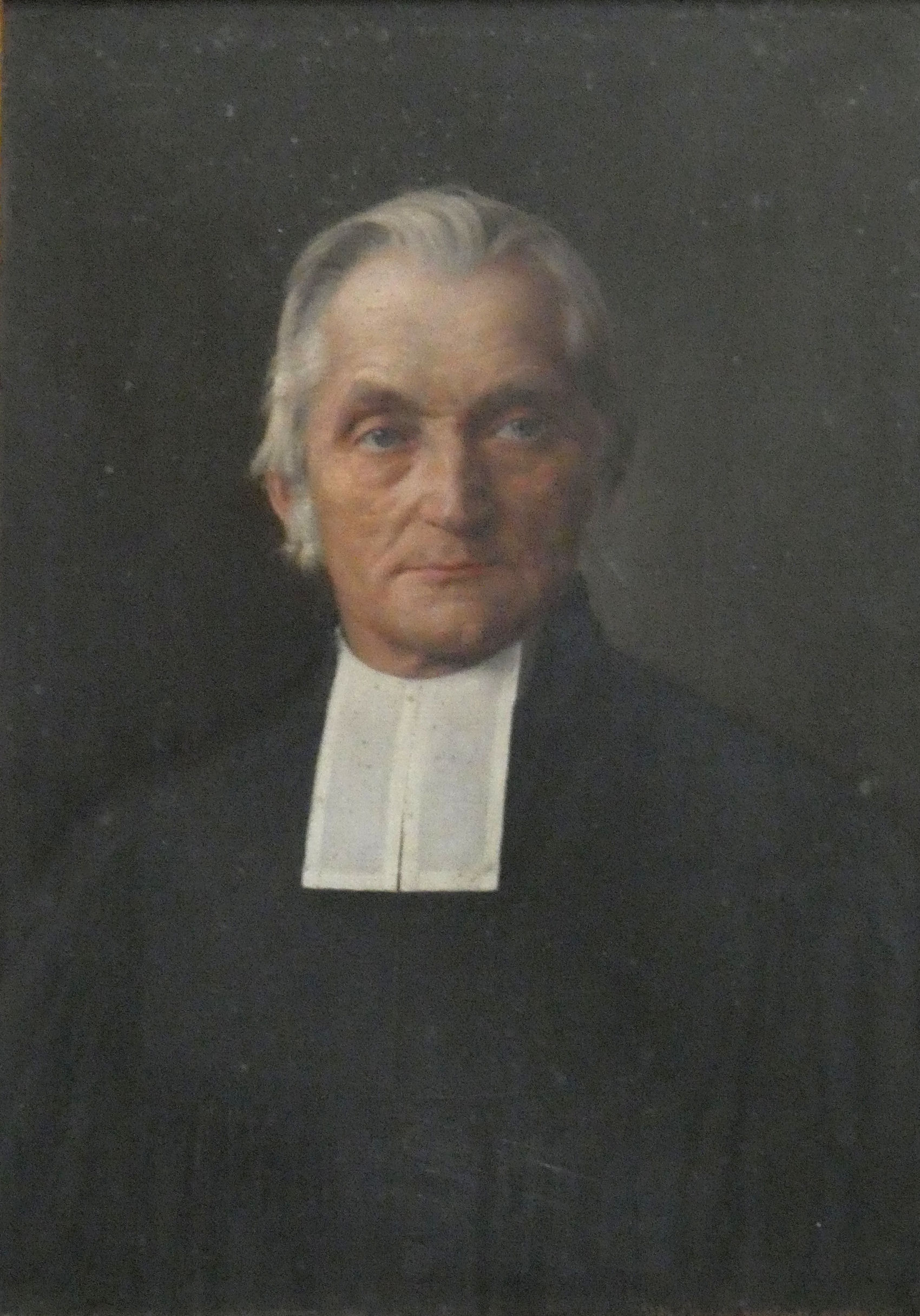 Fotografische Reproduktion (bearb.) eines Porträtgemäldes des Oberpfarrers der Marktkirche Halle Hermann Ludwig Dryander